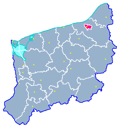 (pl:) Powiat Koszalin (grodzki) w województwie zachodniopomorskim (de:) Kreis Köslin (Stadt) in Woiwodschaft Westpommern (en:) Koszalin City County on Zachodniopomorskie (West Pomeranian) Voivodship